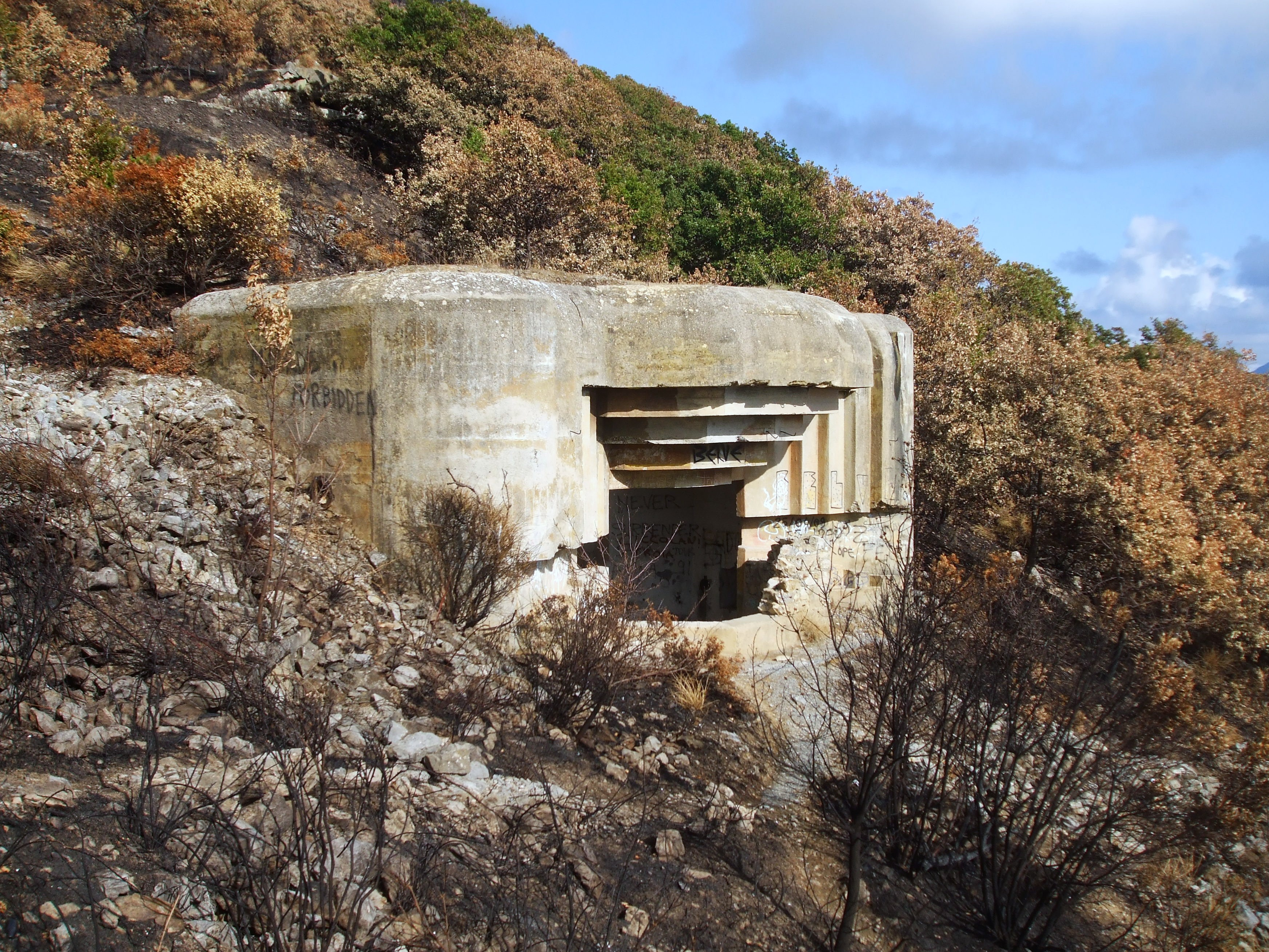 Una delle due casematte che ospitava un pezzo da 152/45